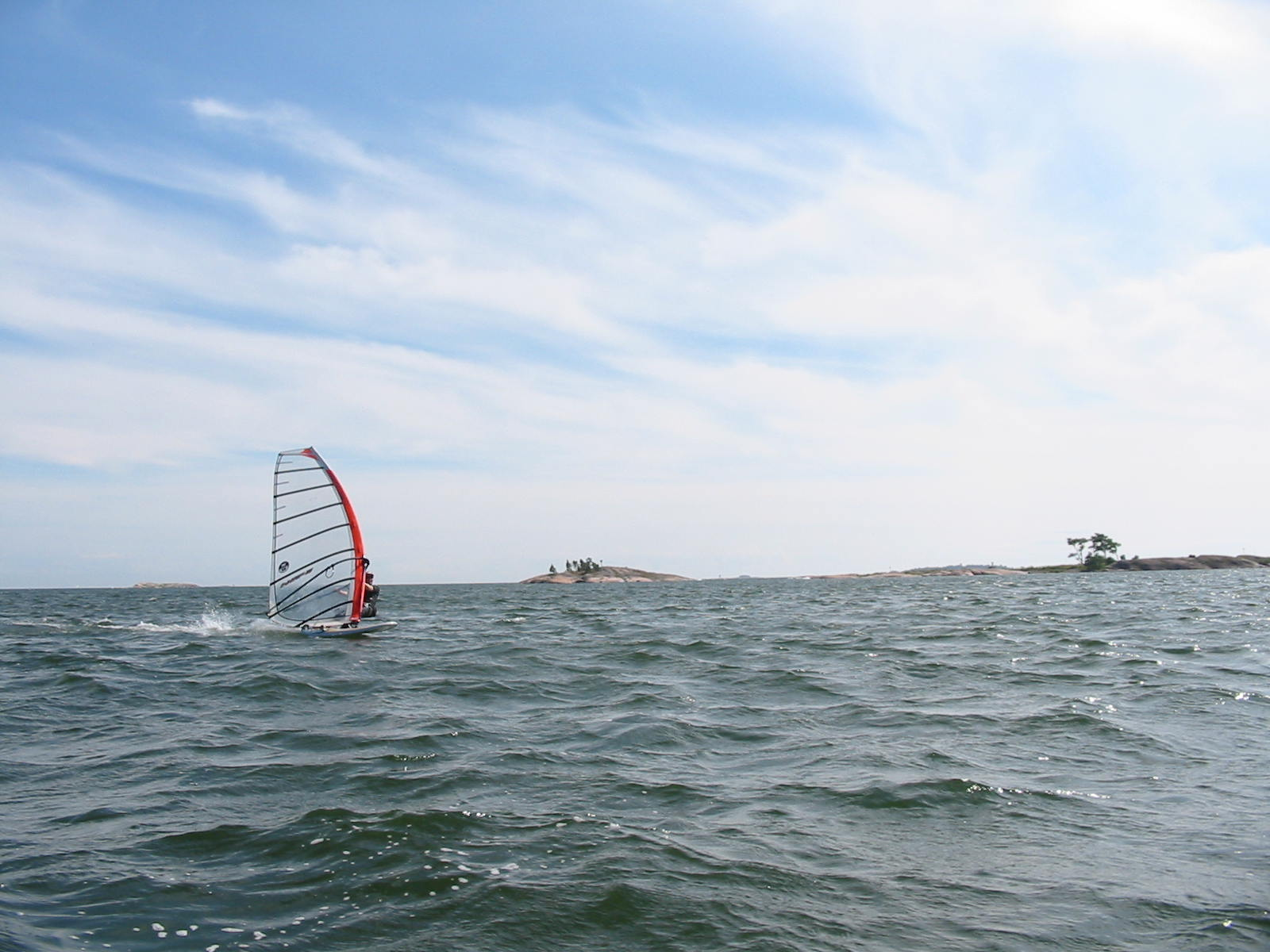 Windsurfing outside Mellsten, Espoo, Finland